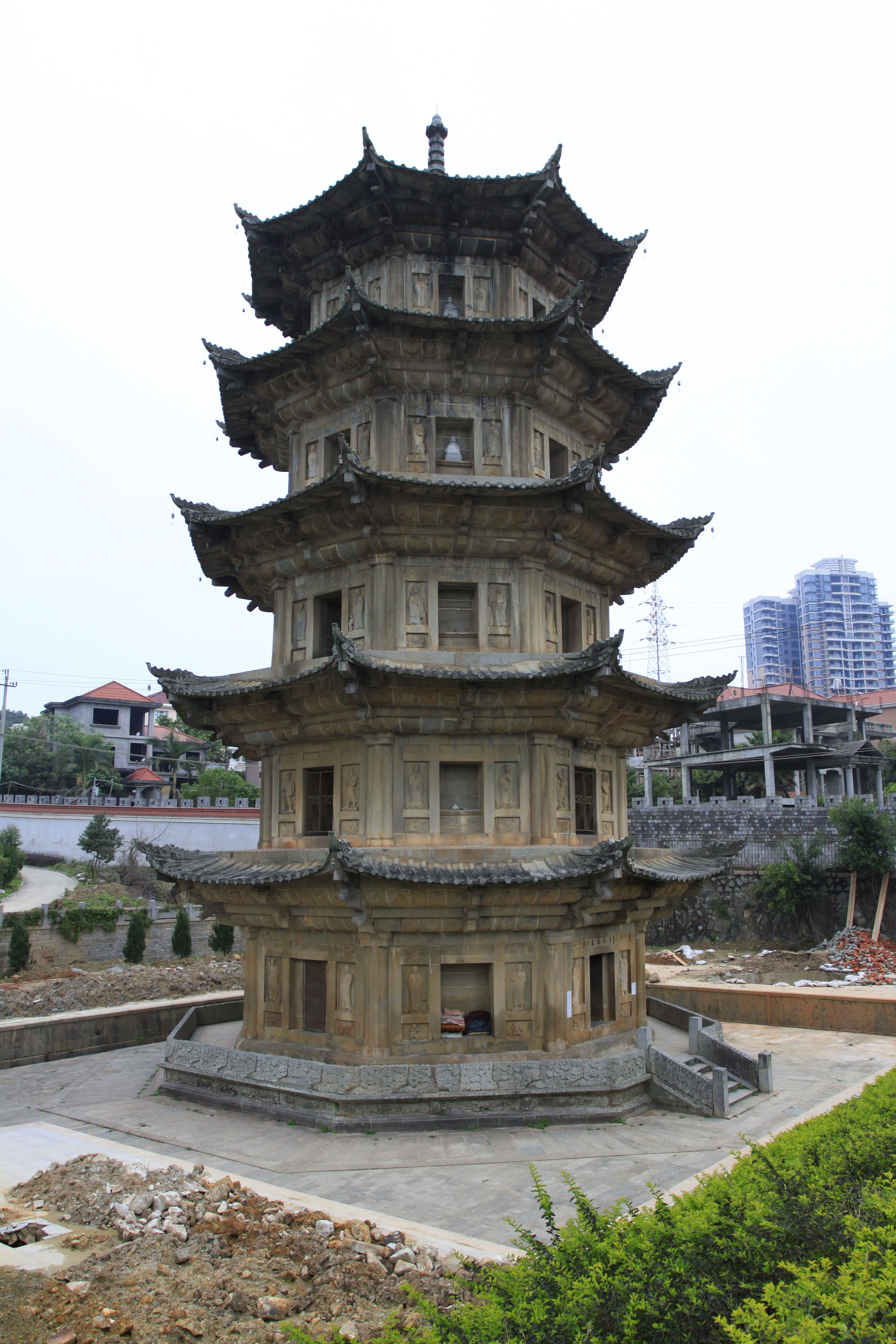 广化寺释迦文佛塔，位于中国福建省莆田市，是全国重点文物保护单位。